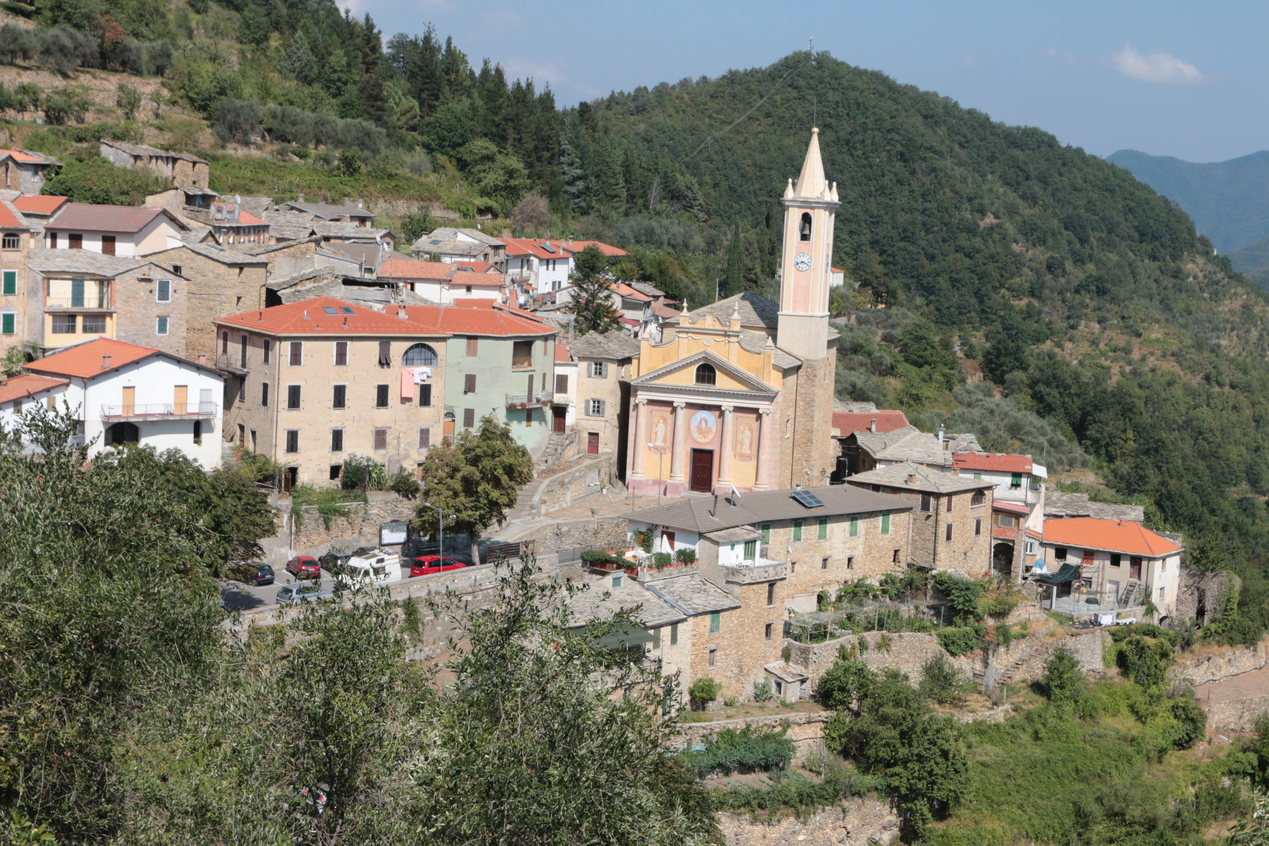 Cenova, frazione del comune di Rezzo; paese dell'entroterra imperiese; paese della pietra; famoso per gli artigiani lapicidi o picapietre .